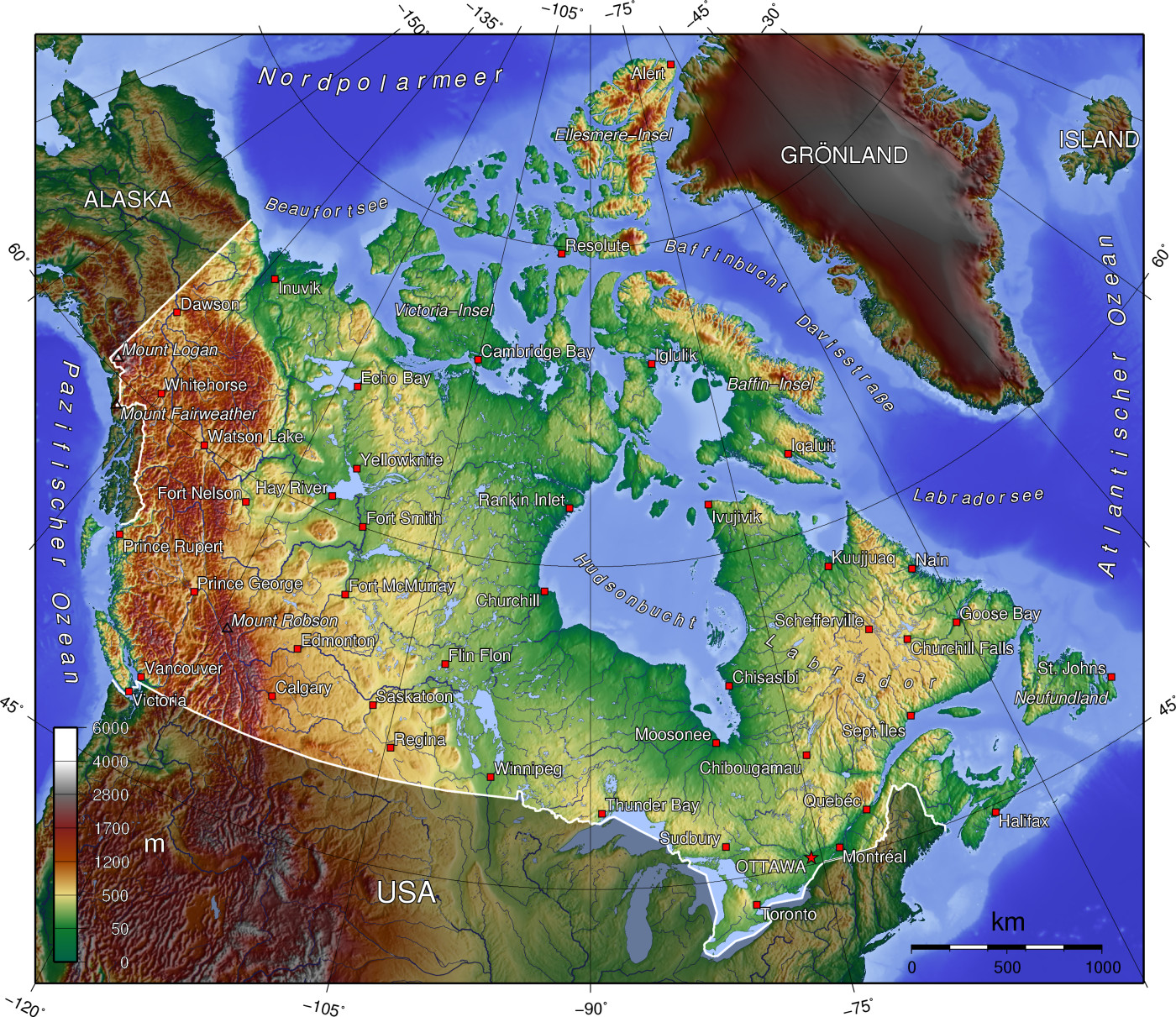 Topografische Karte von Kanada